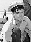 Chief Gunners Mate Paul G. Saunders, USN